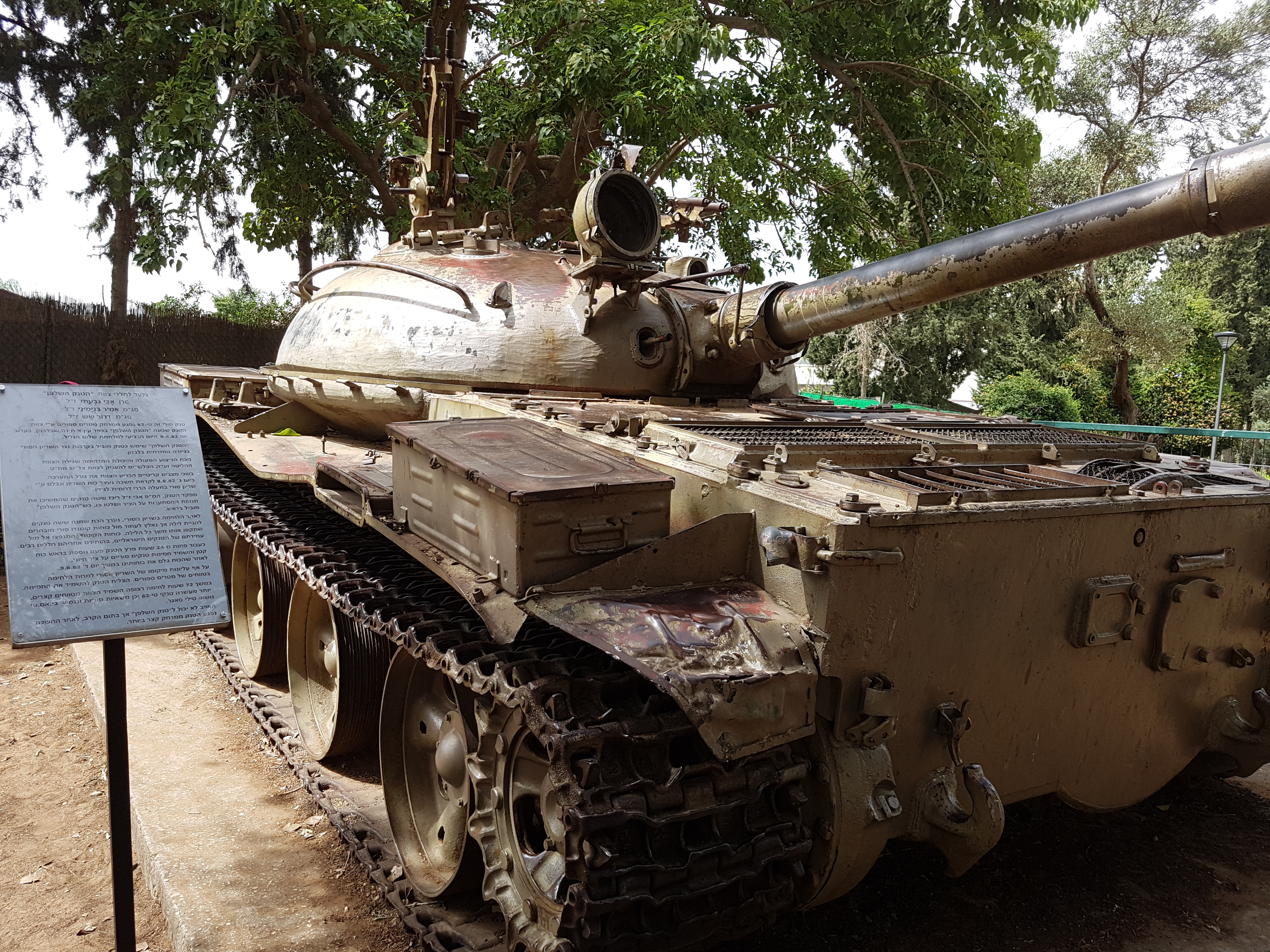 טנק טי-62 סורי שהושמד בידי צוות "הטנק השלפן": דרור שש, אמיר בנימיני, רם אלון ואבי גבעתי, במלחמת לבנון הראשונה